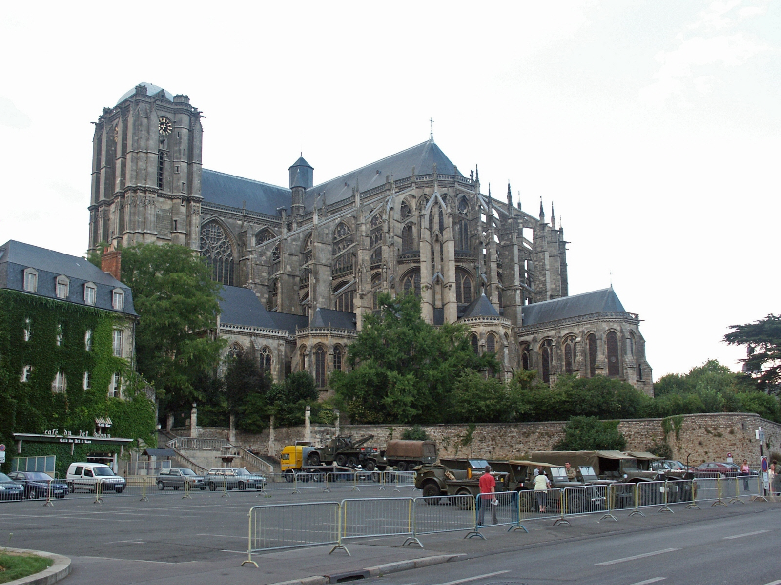 Le Mans (Sarthe, France); Cathédrale Saint-Julien.